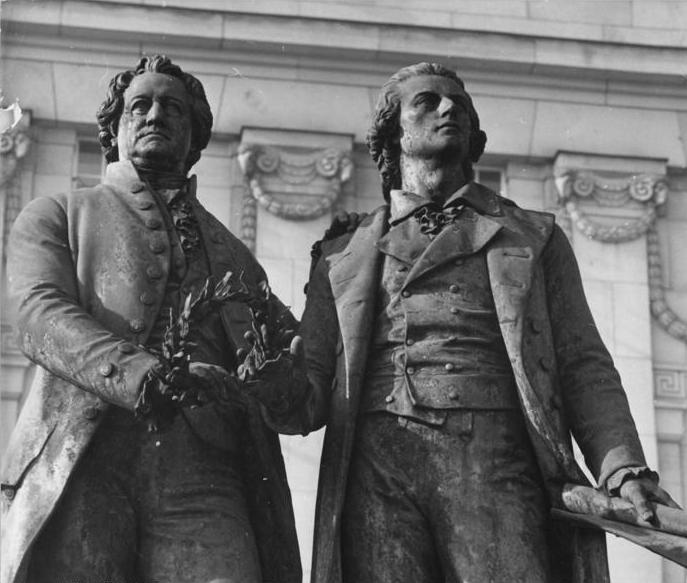 Weimar, Goethe-Schiller-Denkmal, Nationaltheater Zentralbild Link 8.1.1966 Weimar- die Stadt deutscher Klassik Die kleine Stadt Weimar in Thüringen, dem grünen Herzen Deutschlands, zählt zu den berühmtesten Städten Deutschlands. Vor allem wurde sie berühmt durch das Wirken von Lucas Cranach, Johann Sebastian Bach, durch die Klassiker der deutschen Literatur Wieland, Herder, Schiller und Goethe und durch das Wirken des ungarischen Komponisten und Pianisten Franz Liszt. UBz: Das Goethe-Schiller-Denkmal vor dem Deutschen Theater in Weimar. Es wurde im Jahre 1857 von dem Dresdner Bildhauer Ernst Rietschel geschaffen. Goethes reife, im Diesseits verwurzelte Menschlichkeit und Schillers jugendlich emporstürmender Idealismus sind in dem volkstümlichen Denkmal treffend dargestellt worden